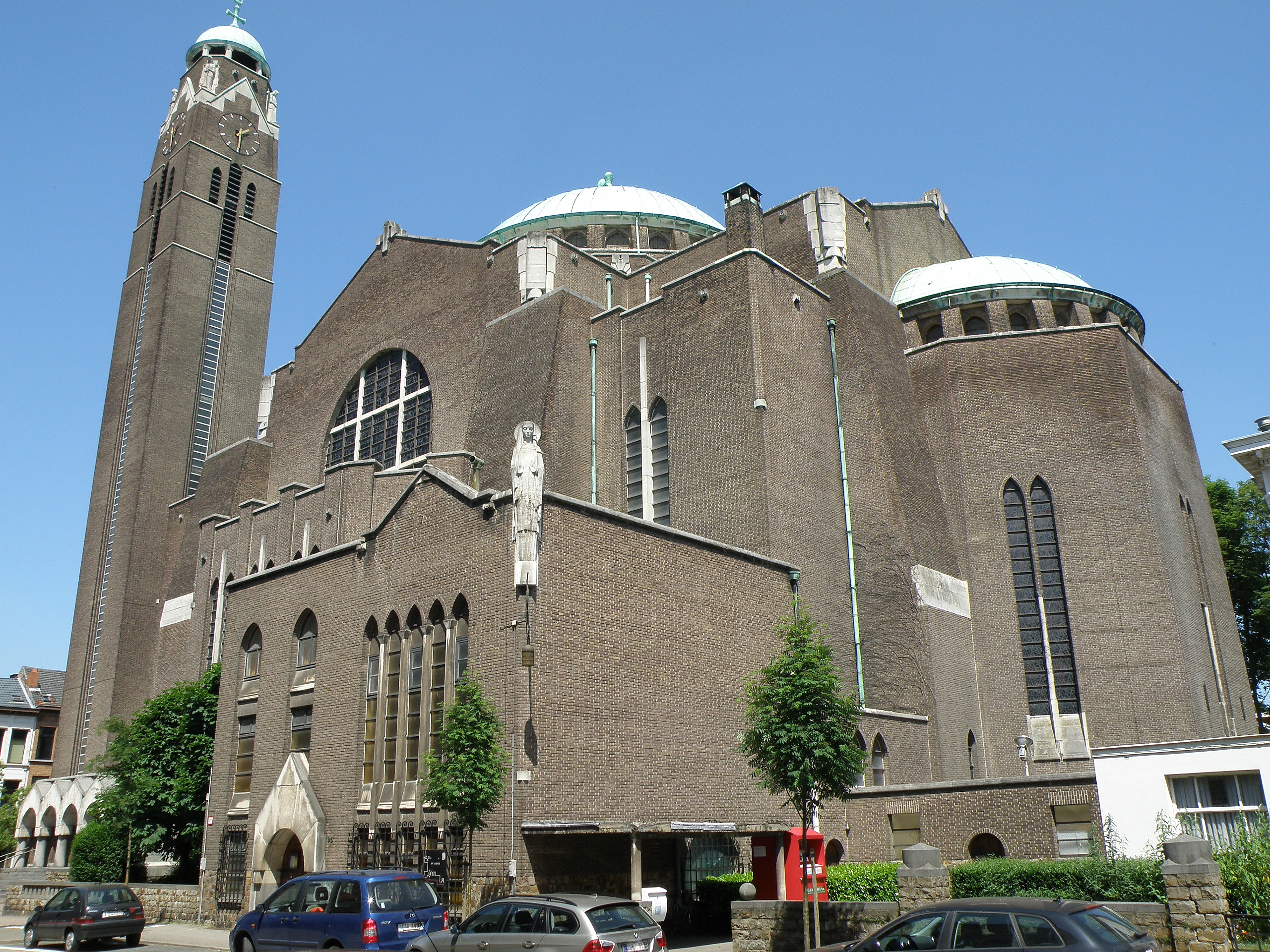 Anvers, Belgique. Église Saint-Laurent, sise à l’angle des rues Van Schoonbekestraat / Markgravelei, de style Art déco et néo-byzantin. Architecte : Jef Huygh, date d’achèvement 1934 (clocher : 1941).